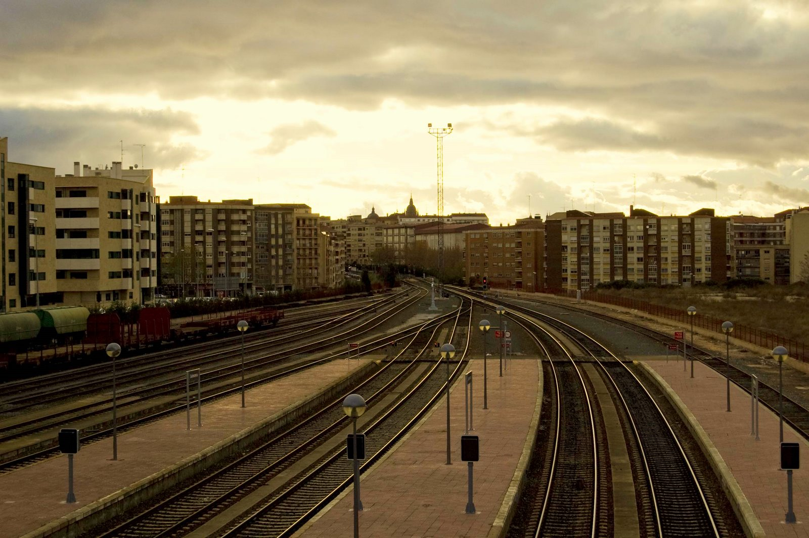 vías y andenes